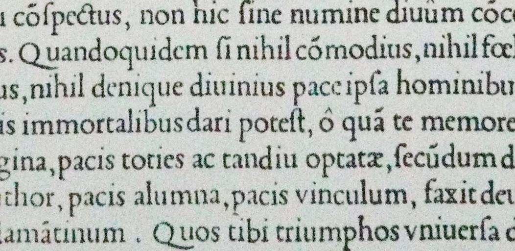 Voorbeeld van vroeg letterontwerp van Claude Garamond, afkomstig van de eerste pagina van Robert Estienne, Illustrissimae Galliarum Reginae Helianorae, 1531